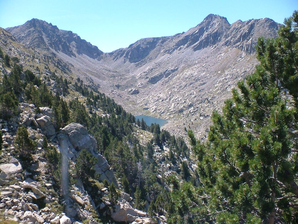 Colla i Pic de Morrano, i Estany de la Ribera; la Vall de Boí, Alta Ribagorça, Catalunya